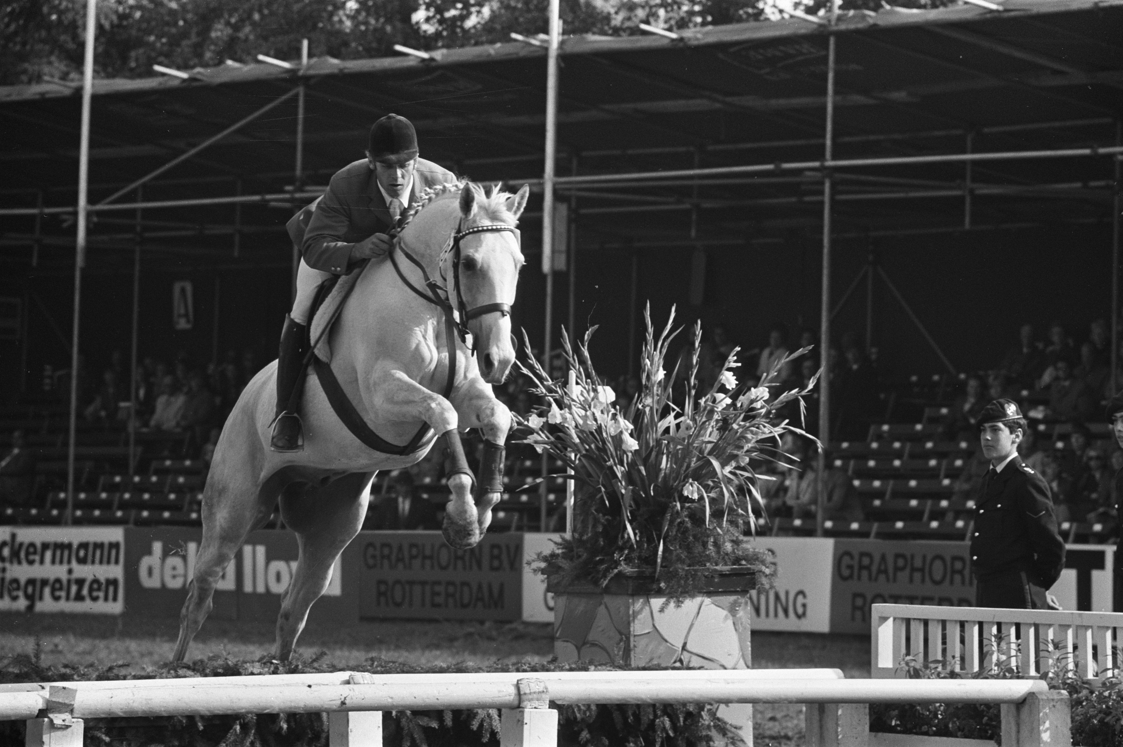 Collectie / Archief : Fotocollectie Anefo Reportage / Serie : [ onbekend ] Beschrijving : CHIO in Rotterdam, H. Snoek (West-Duitsland) in aktie Datum : 13 september 1972 Locatie : Rotterdam, Zuid-Holland Trefwoorden : concoursen Persoonsnaam : Snoek H. Instellingsnaam : CHIO Fotograaf : Peters, Hans / Anefo Auteursrechthebbende : Nationaal Archief Materiaalsoort : Negatief (zwart/wit) Nummer archiefinventaris : bekijk toegang 2.24.01.05 Bestanddeelnummer : 925-8743